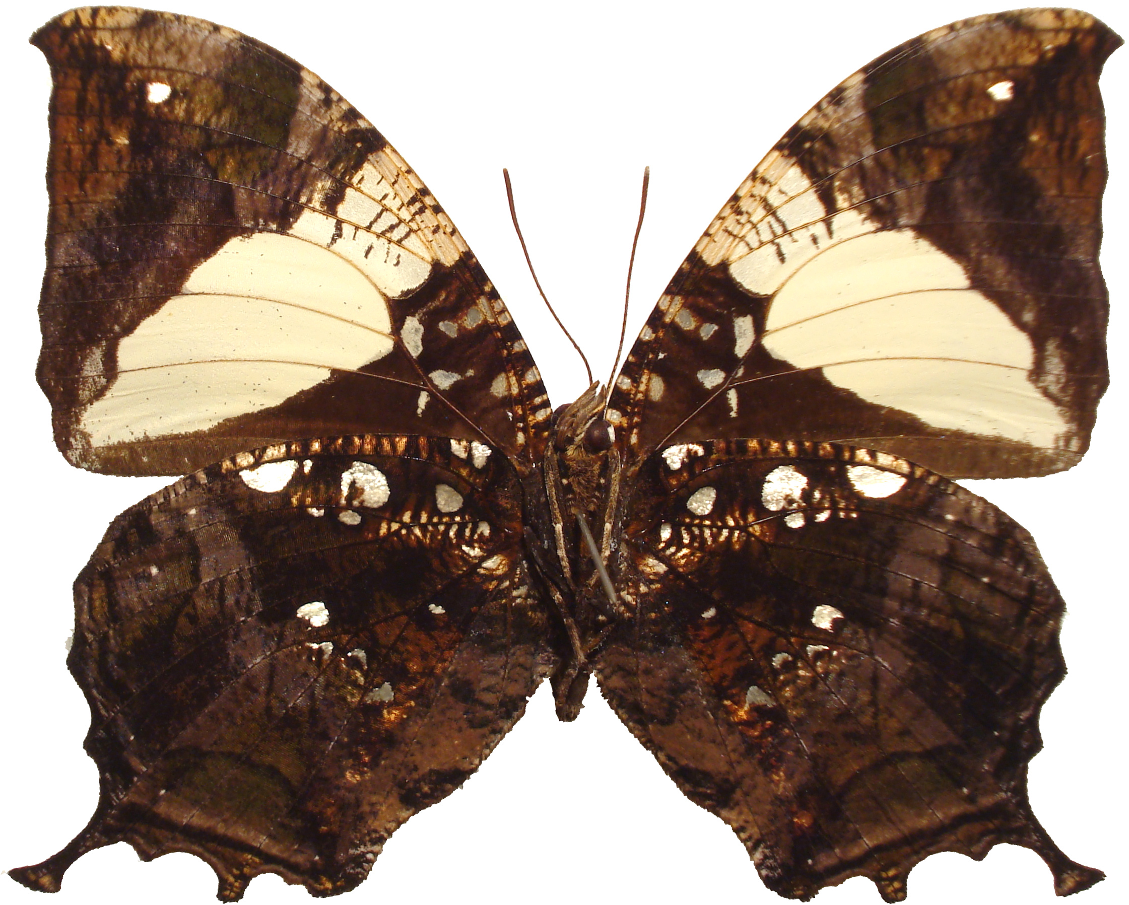 Hypna clytemnestra - face dorsale - Moyobamba, Perou